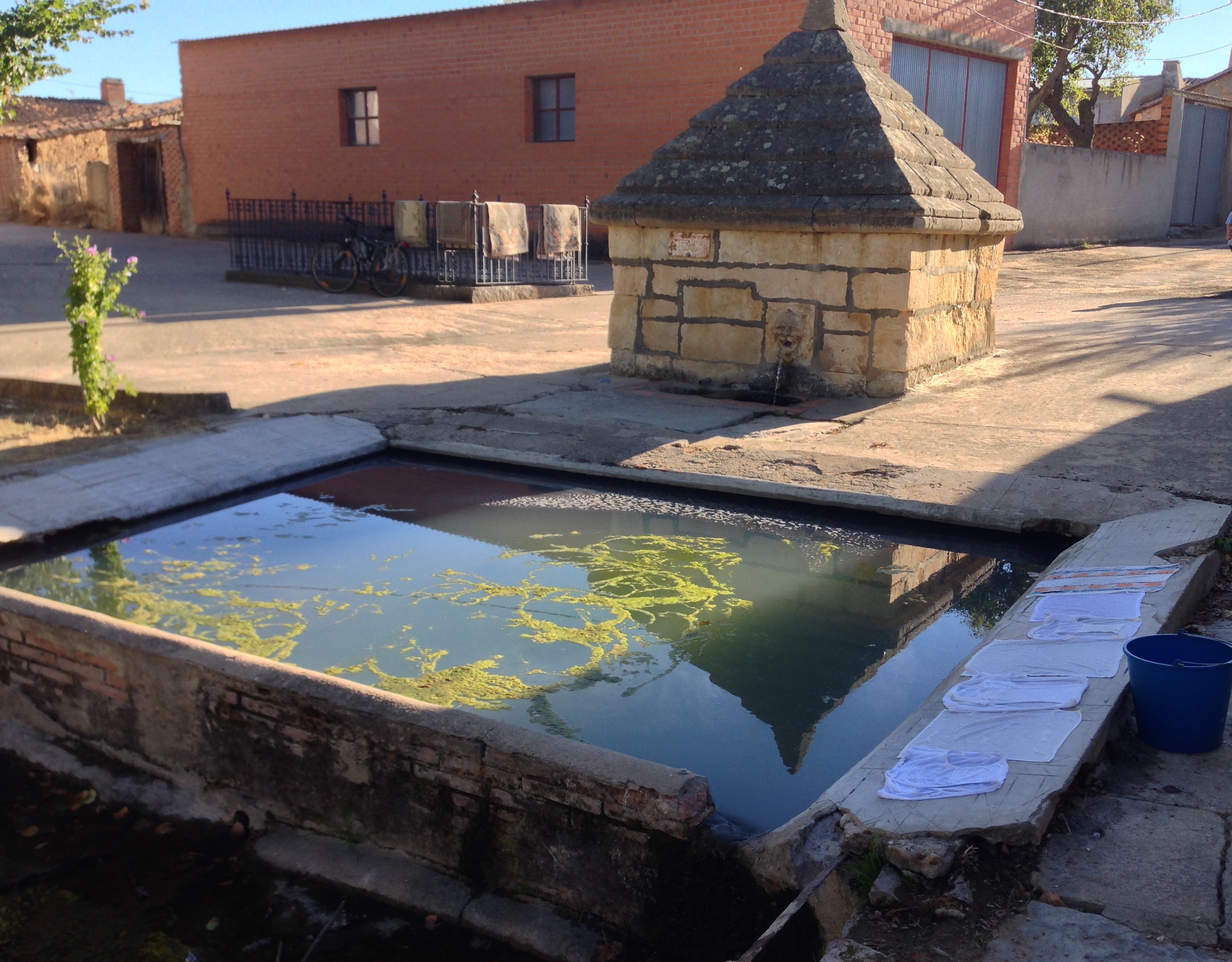 Posible origen romano. Los lavaderos son del siglo XX. Como se puede apreciar, todavía están en uso.